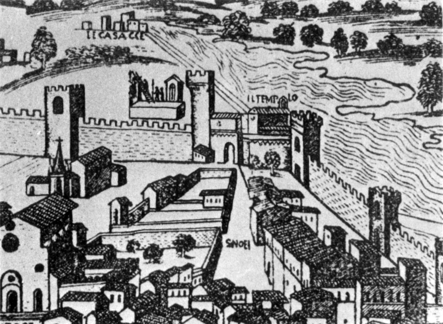 Pianta della catena (1470 ca.), porta della giustizia, il tempio e le casacce.jpg